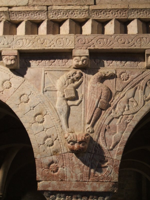 Prieuré de Serrabone : Détail de la tribune